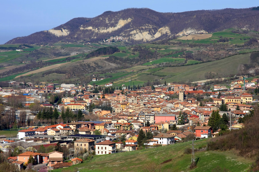 Panorama di Varzi (PV)